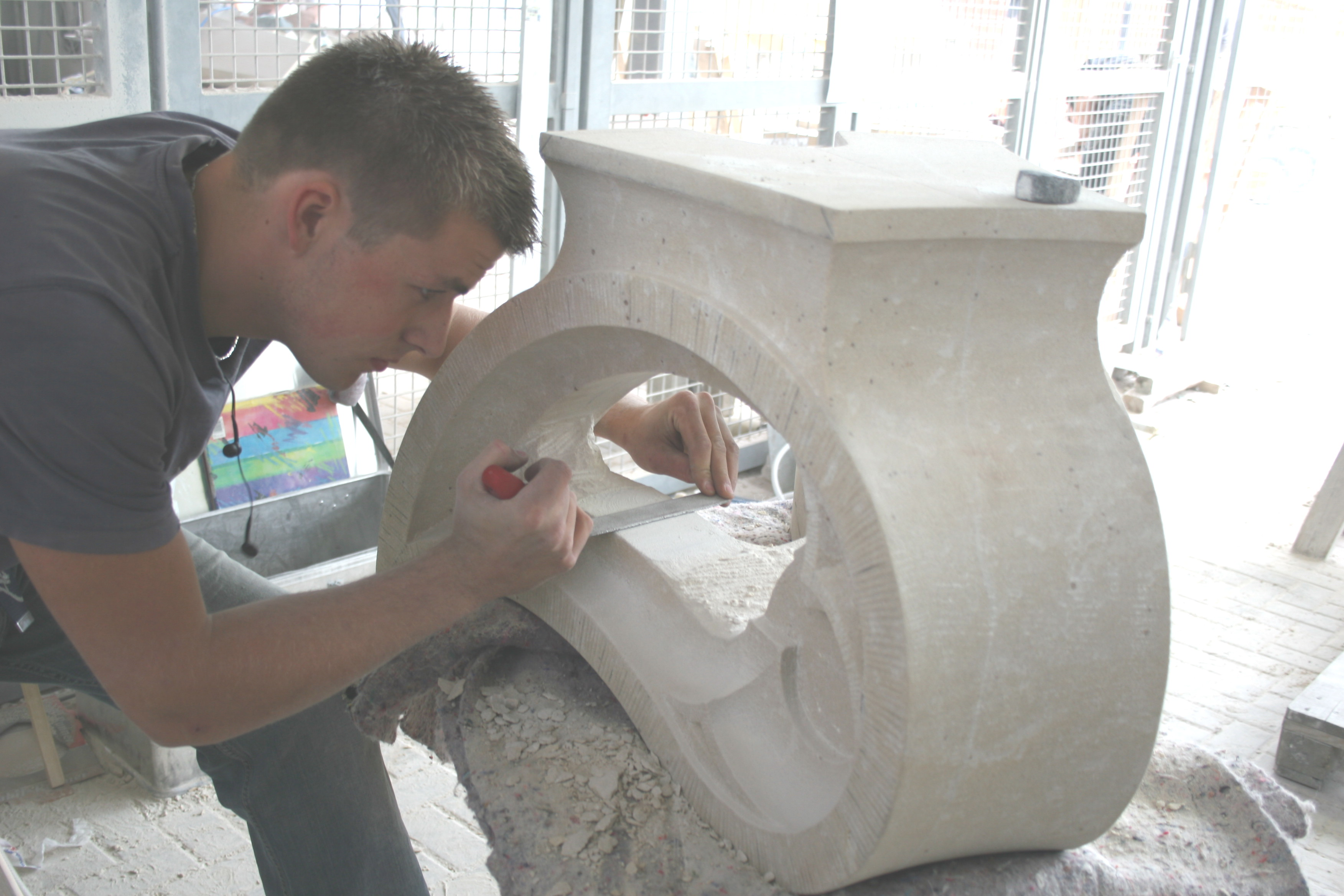 Steinmetz